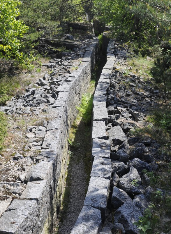 Løpeganger ved Kjøkøy fort